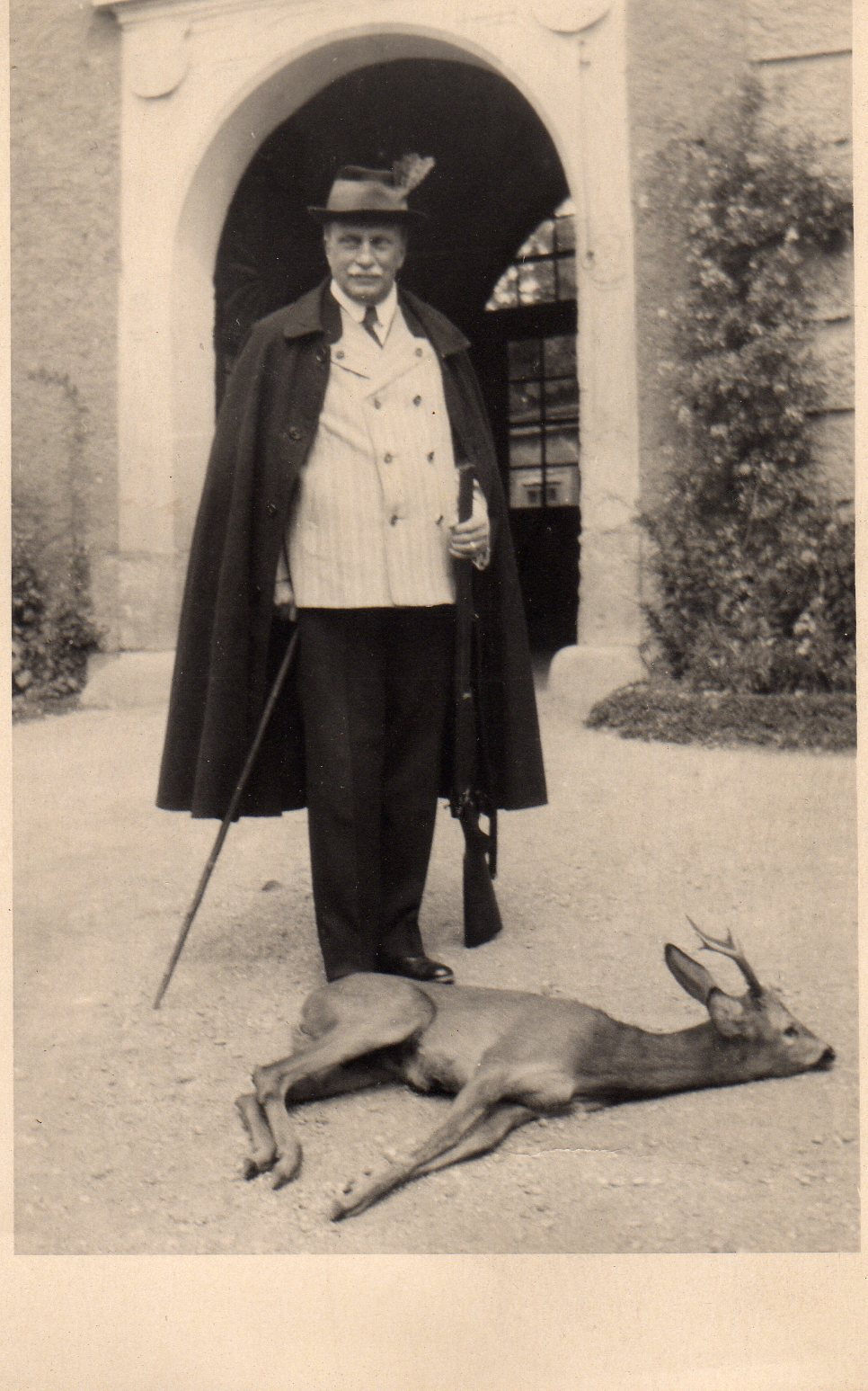 Hermann Graf von Attems-Heiligenkreuz, 1865-1951, K.u.K. Kämmerer, Landesreg. Vizepräsident u. Landesamtsdir. i. R., Ehrenbürger der Städte Linz, Uhrfahr, Enns u.a., Sohn des Anton August Gf. v. Attems-Gilleis, 1834-1891, und der Maria, 1836-1906, geb. Gfin. zu Hardegg auf Glatz u. im Machlande, K.u.K. PD., StkrD.